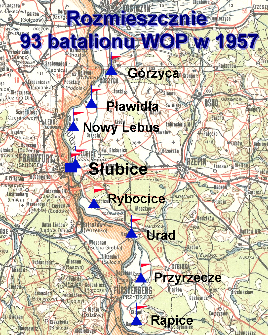 Rozmieszczenie 93 batalionu WOP w 1957